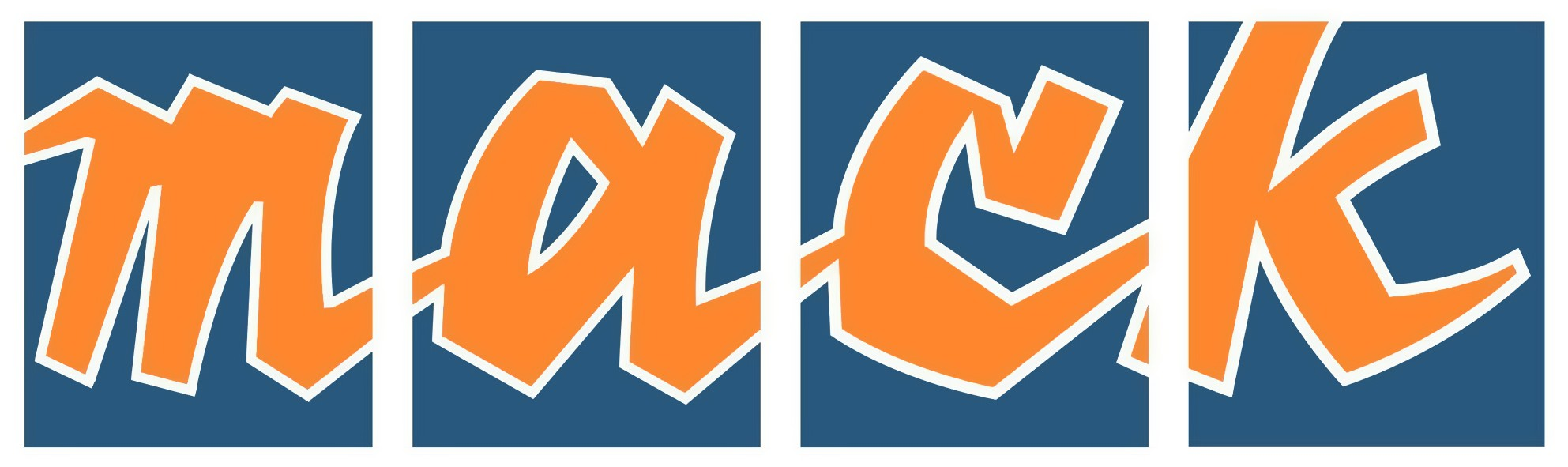 MACK logotype